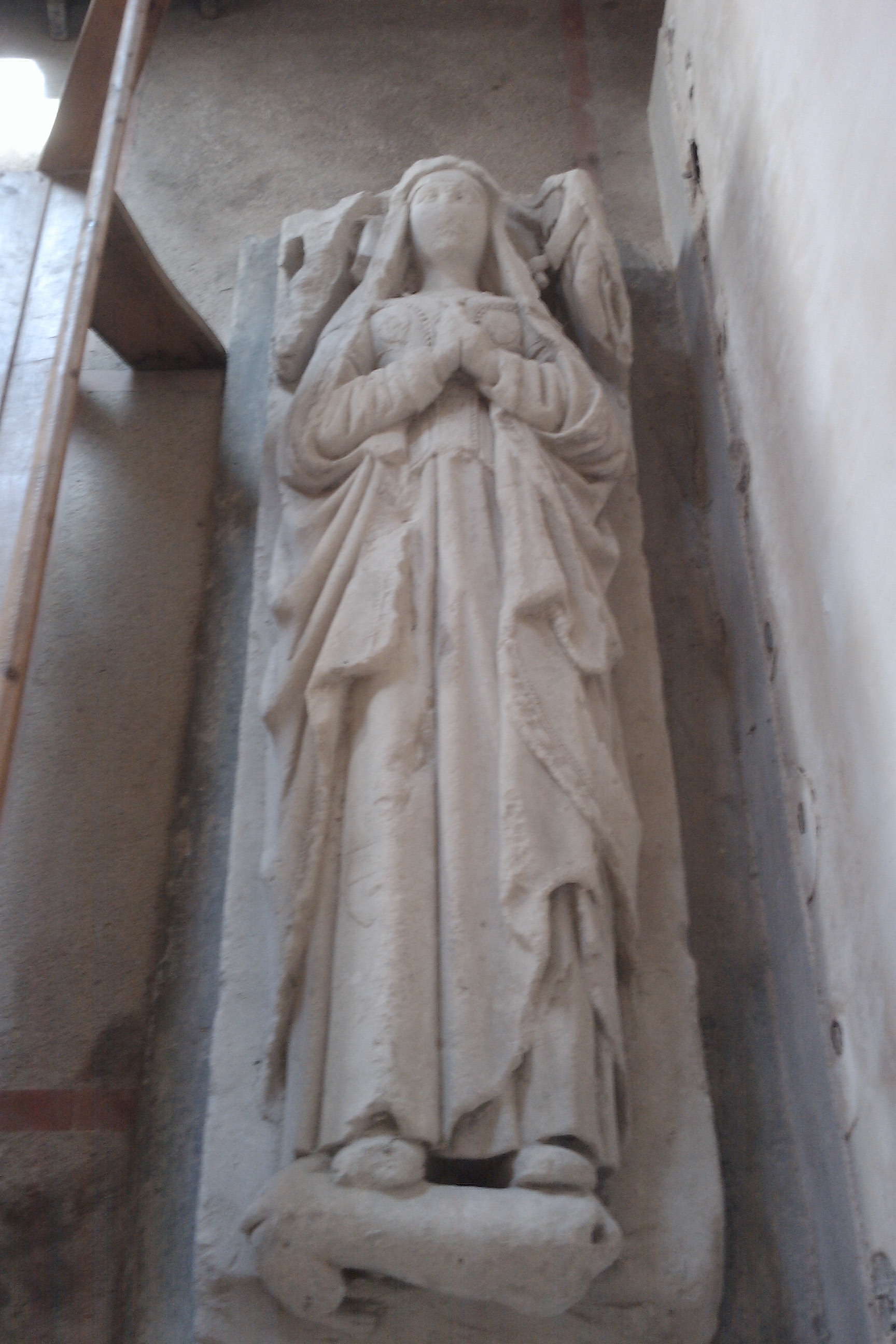 Gisant de femme 16th century